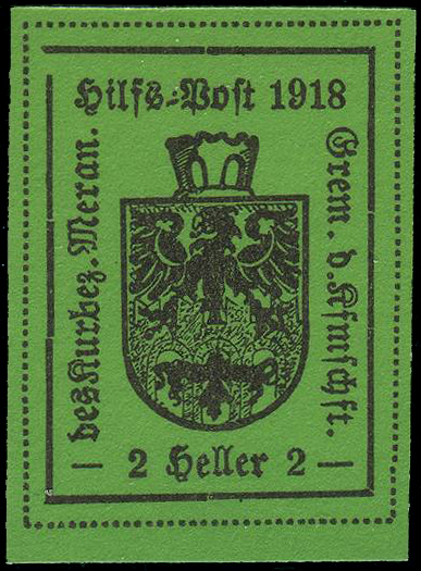 Марка частной почты города Мерано (Италия)